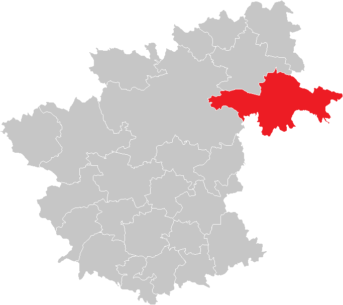 Bezirk Zwettl